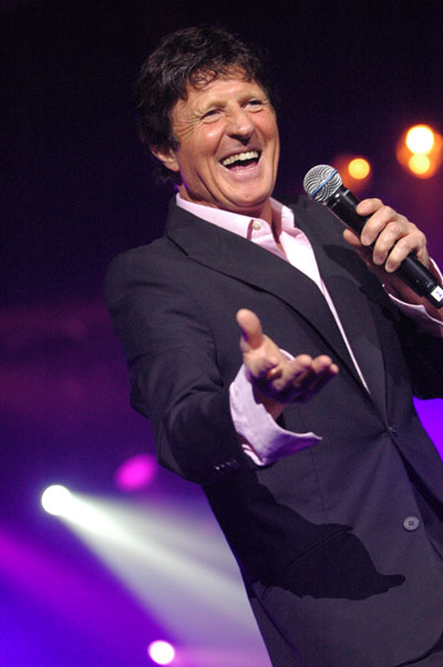 Michel Orso